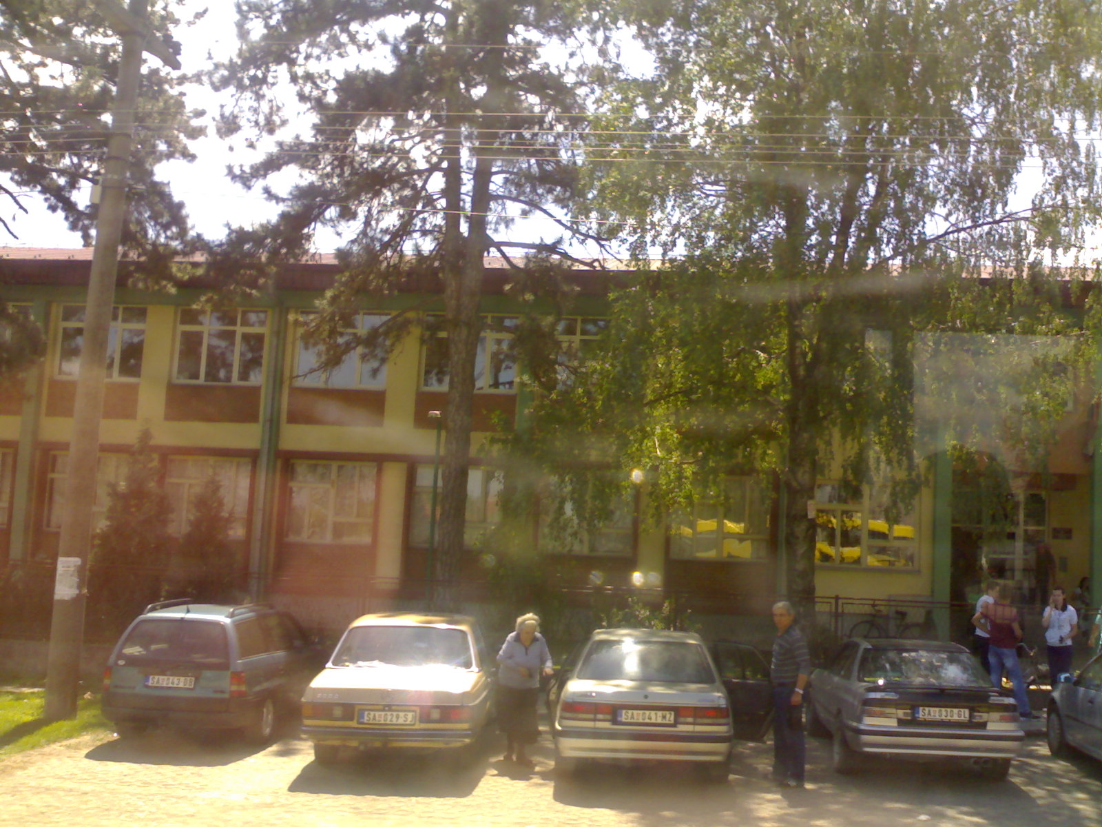 Село Мајур-Шабац, основна школа, сликано 6. 5. 2012.